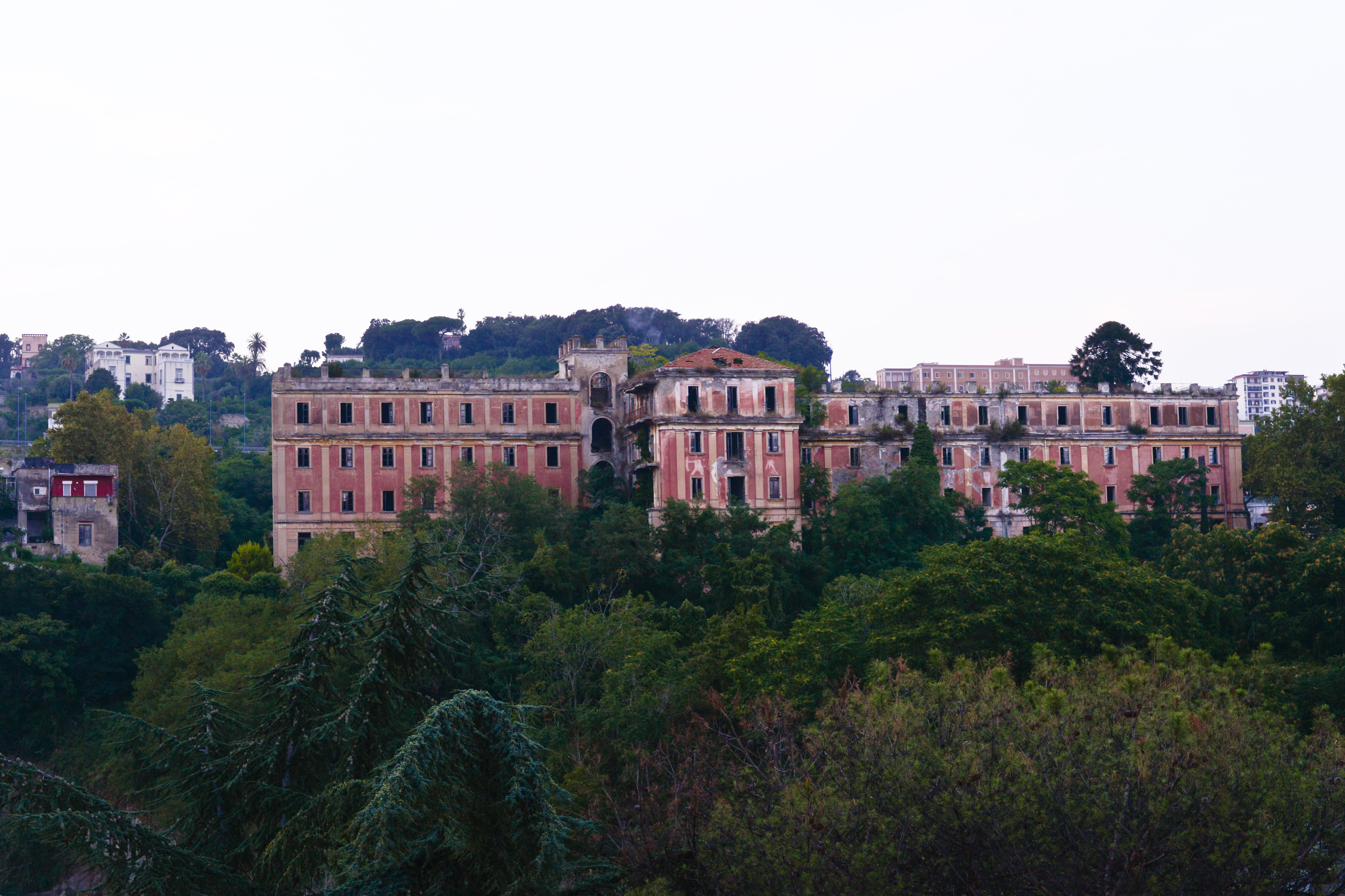 Convitto Pontano alla Conocchia, facciata sud (vista da vico San Nicola alle Fontanelle)